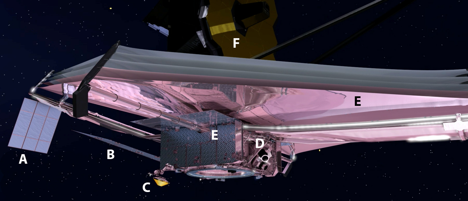 JWST space telescope : Spacecraft artist's view